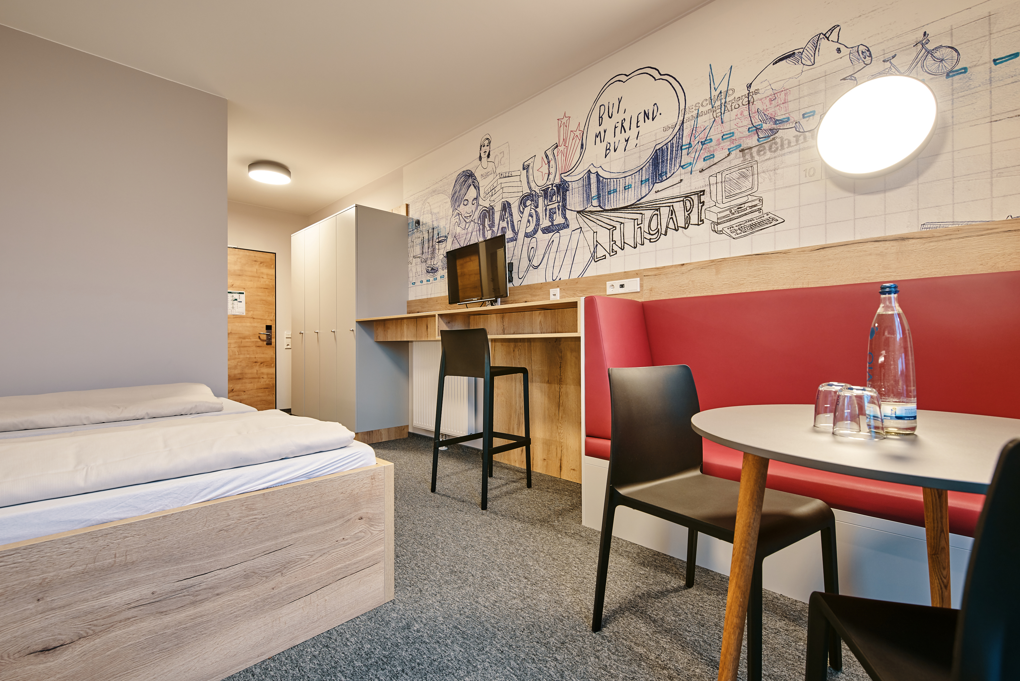 Zimmer in der modernisierten DJH Jugendherberge Oldenburg im Nordwesten Deutschlands.